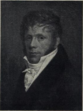 Self-portrait